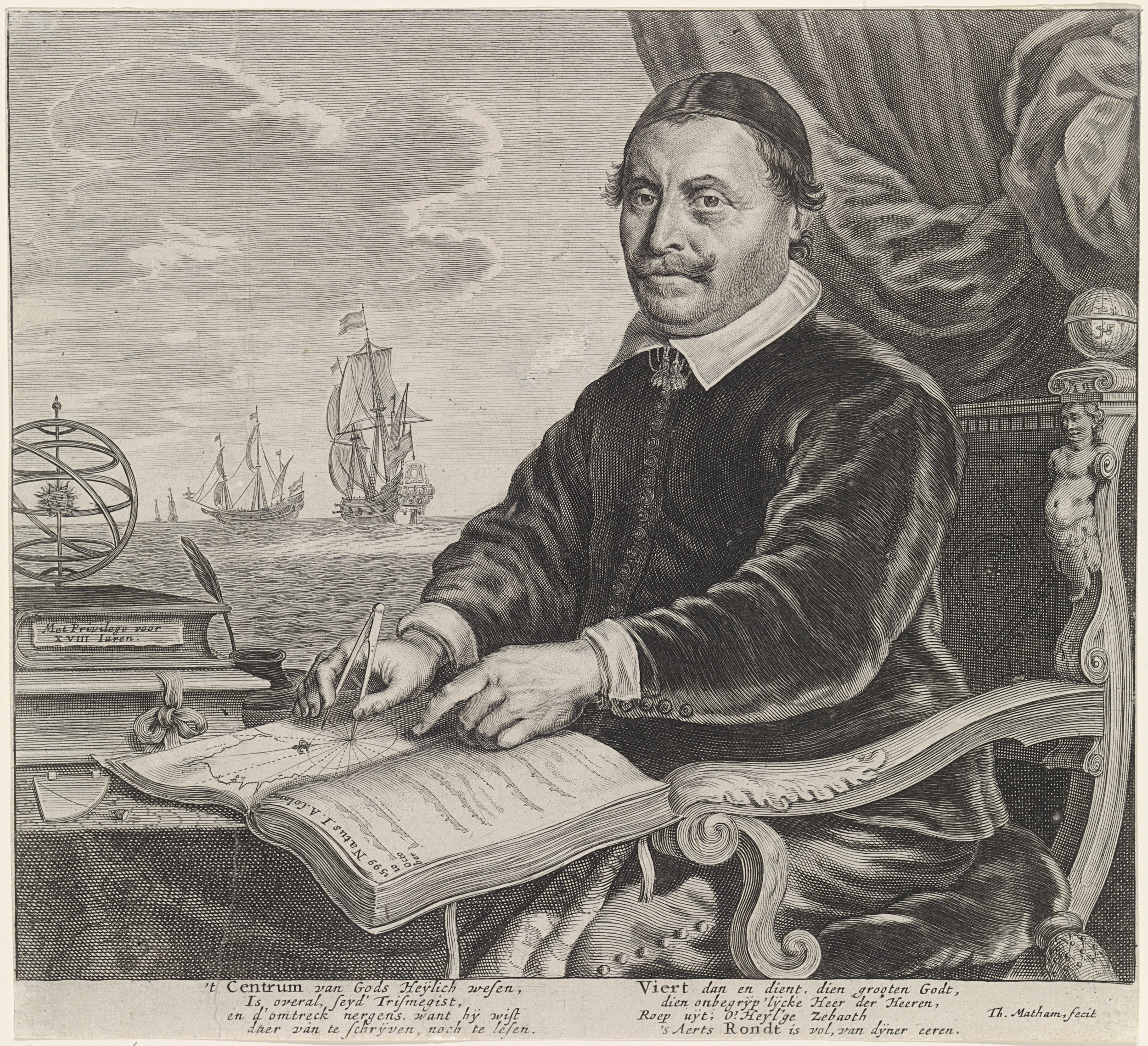 Portret van de mathematicus en cartograaf Jacob Aertsz. Colom, zittend aan een tafel met passer en atlas. Naast hem een inktpot met een schrijfveer, boeken en een armillarium. Op de achtergrond een zee met zeilschepen.